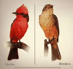 Dimorfismo entre dos individuos de la misma especie Pyrocephalus rubinus, es decir la diferencia morfológica entre el macho y la hembra.